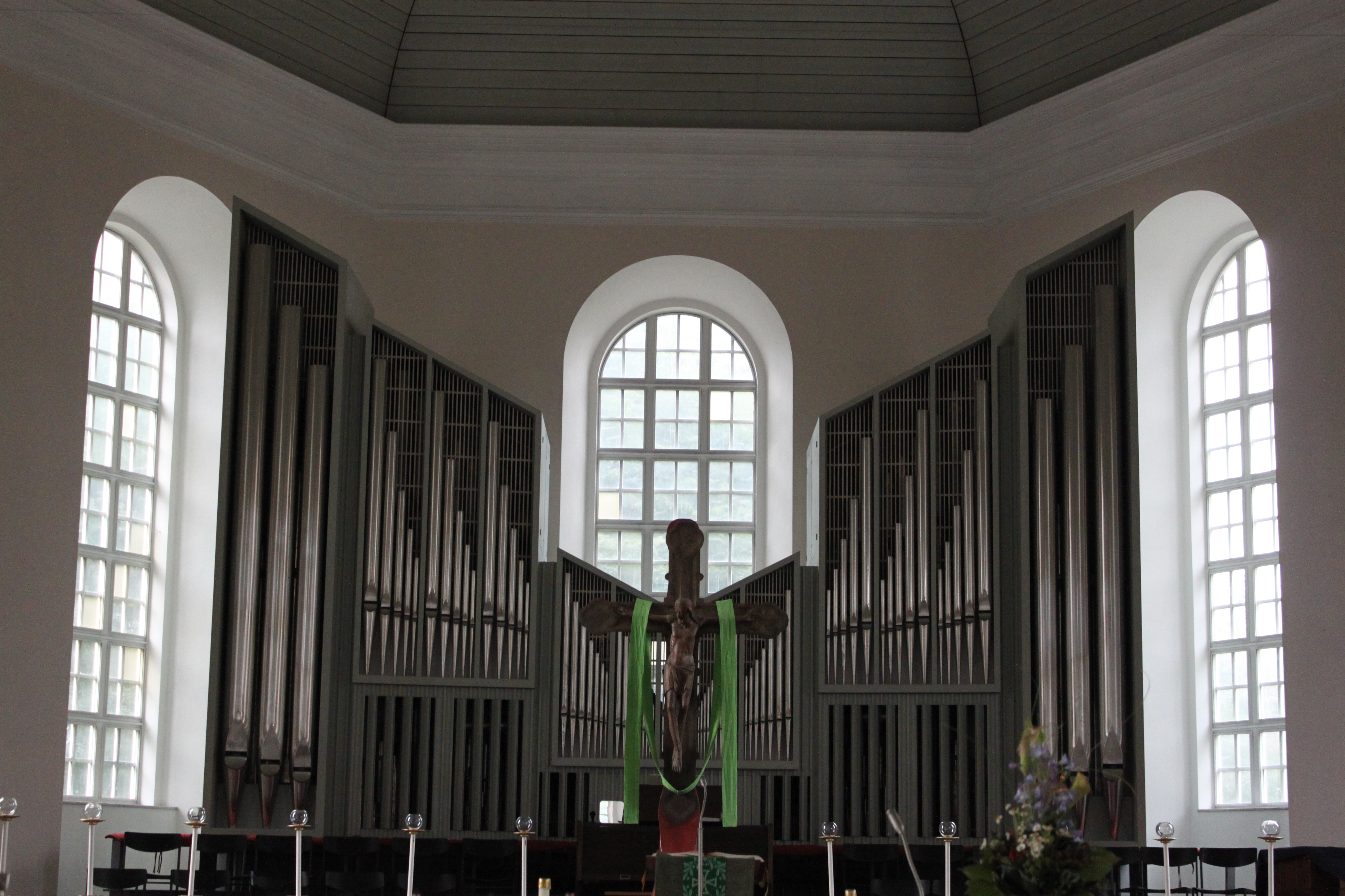 Orgel der Hauptkirche St. Trinitatis in Hamburg-Altona